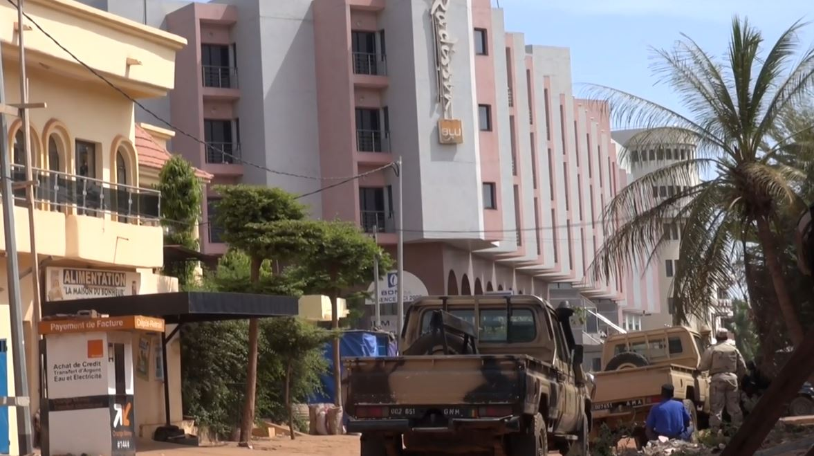 Le Radisson Blu de Bamako, lors de l'attentat du 20 novembre 2015.